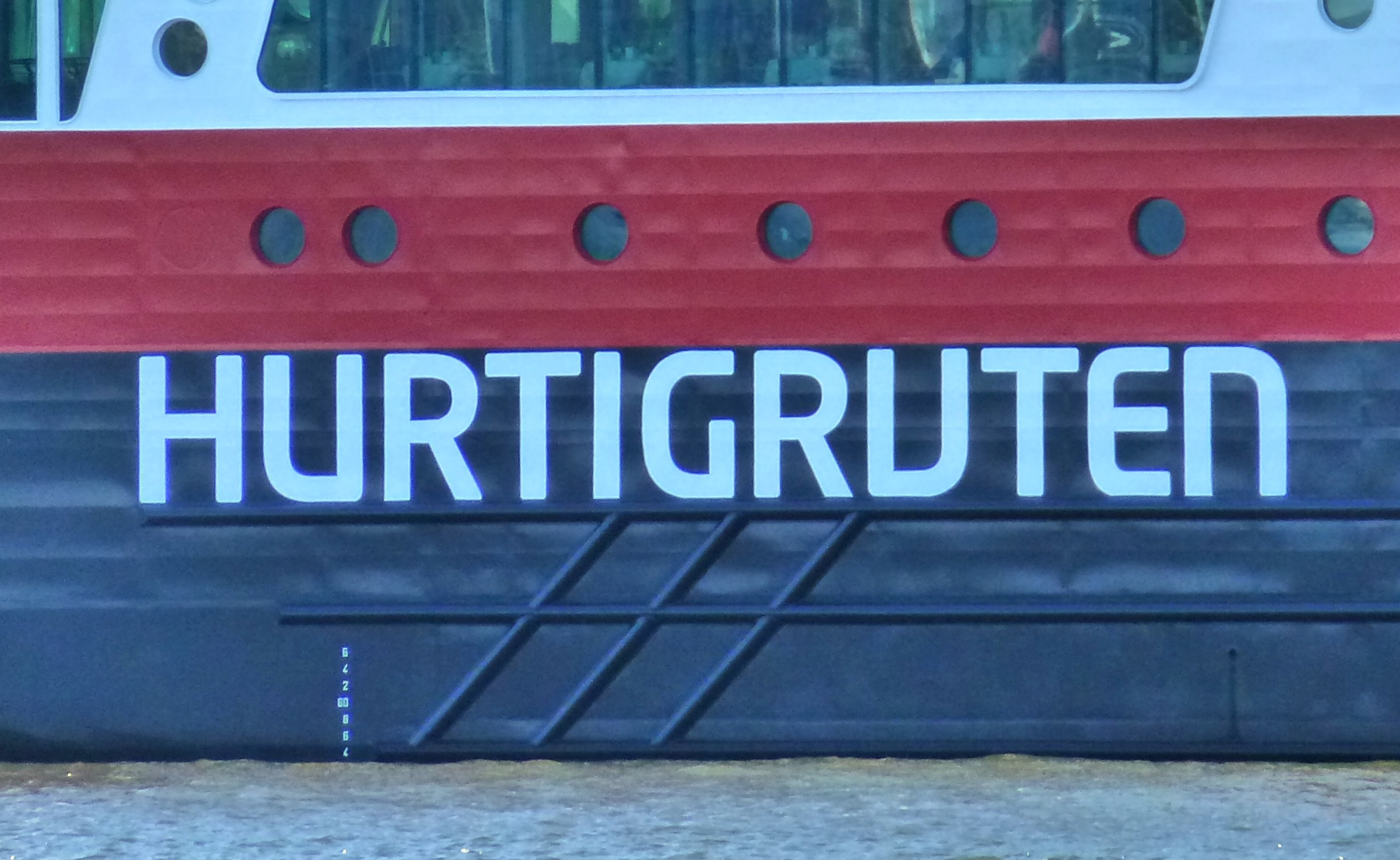 M/S Fram "Hurtigruten"